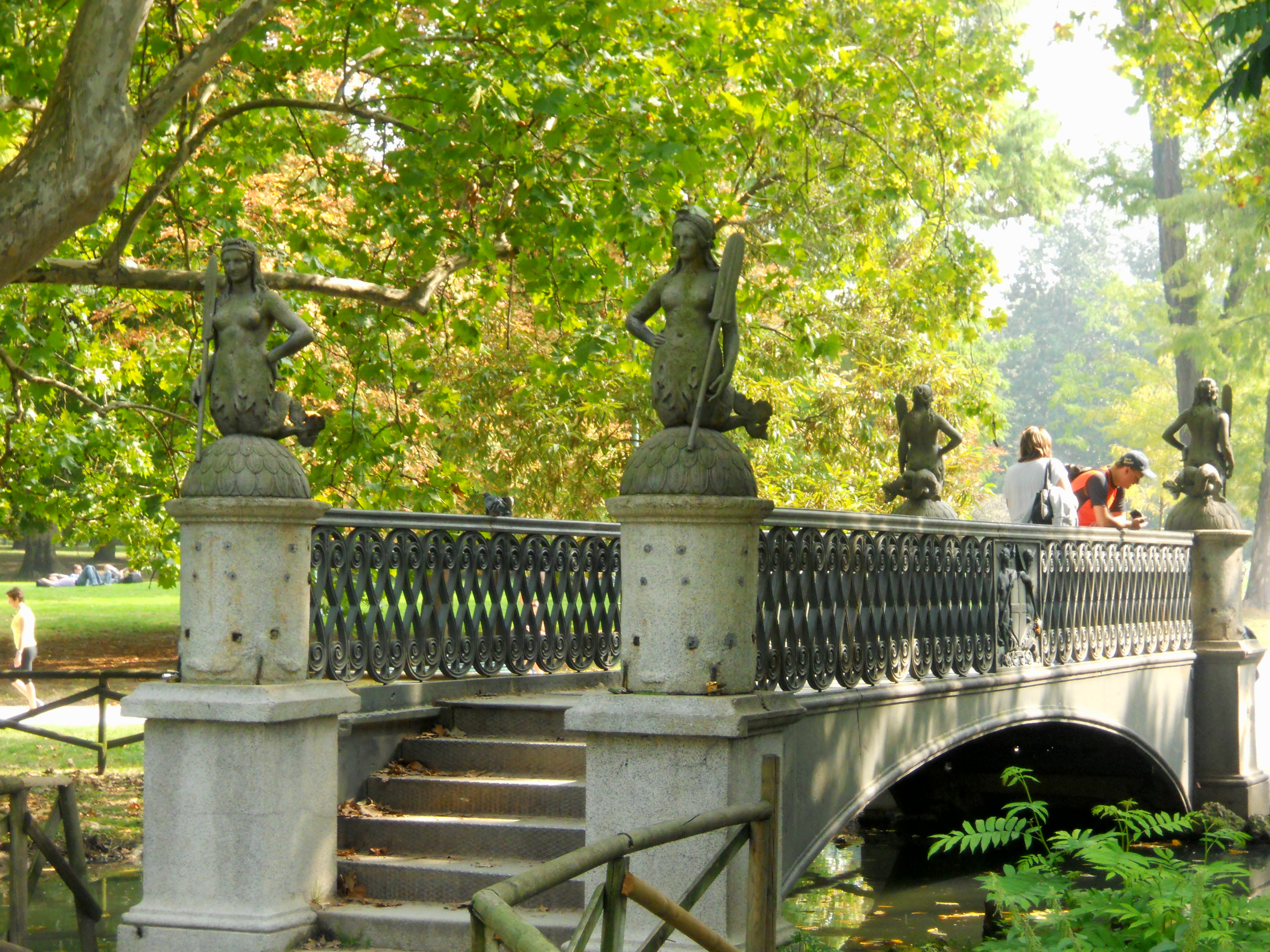 Ponte delle Sirenette